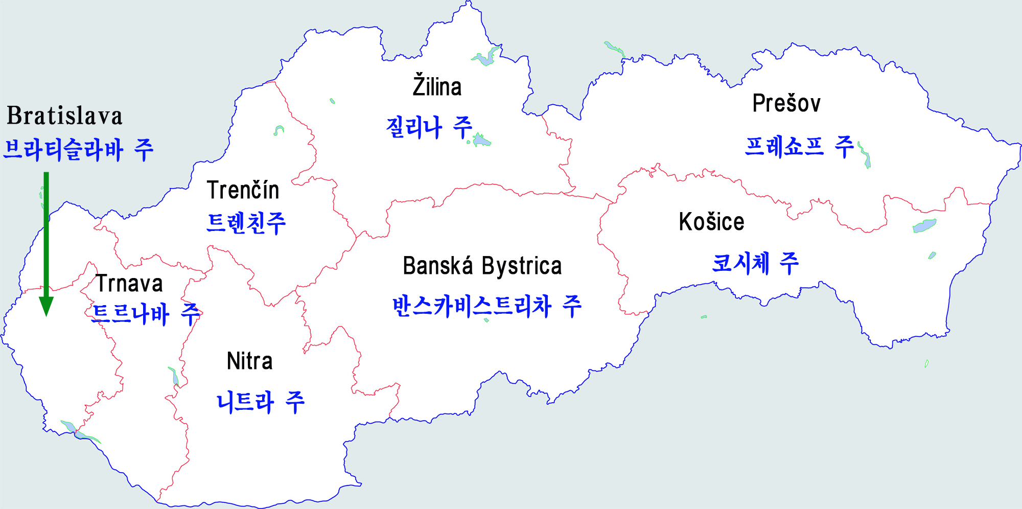 슬로바키아 행정구역